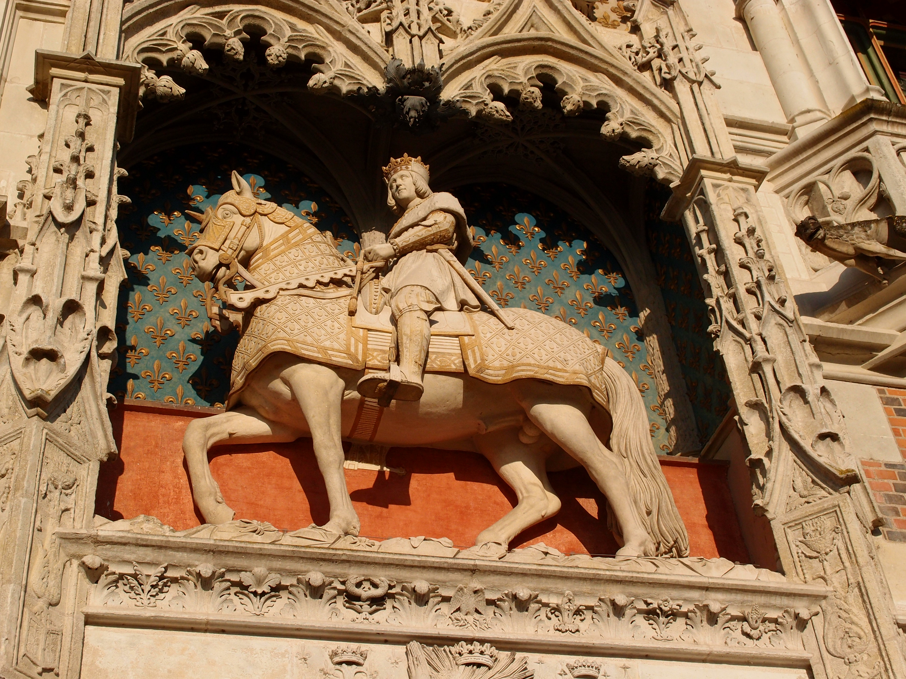 Reiterstandbild König Ludwigs XII. über einem Portal von Schloss Blois (Frankreich) Datum: 16. Jh. Urheber: (mutmaßlich) ital. Bildhauer Guido Mazzoni Quelle: Privates Fotoarchiv des Urhebers